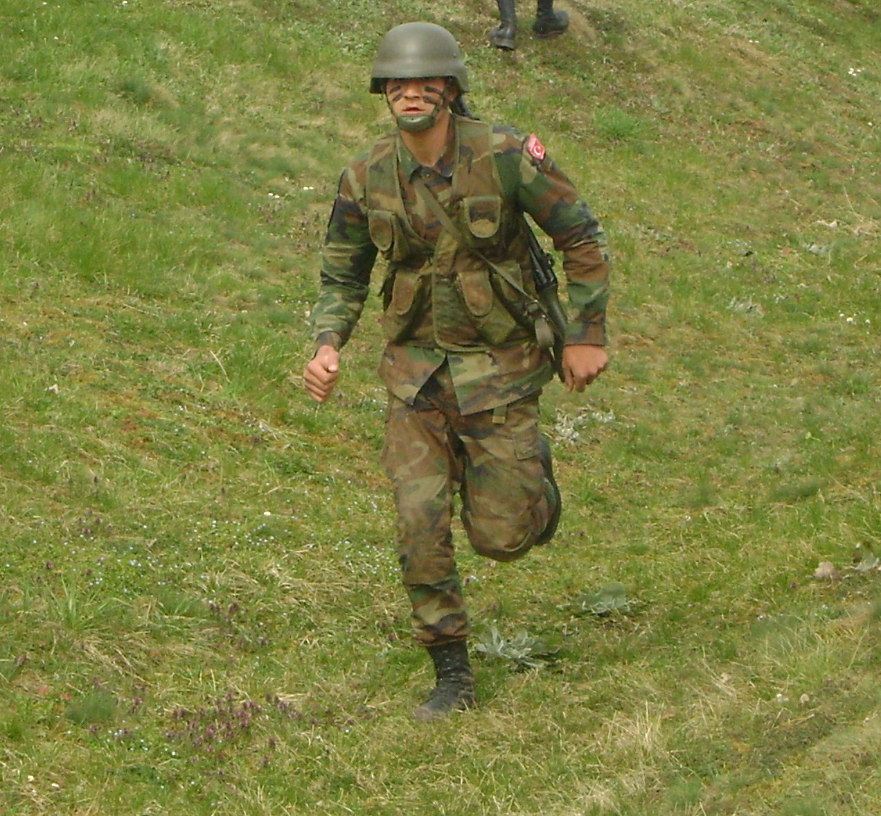 Turkish Soldier with G3-Rifle